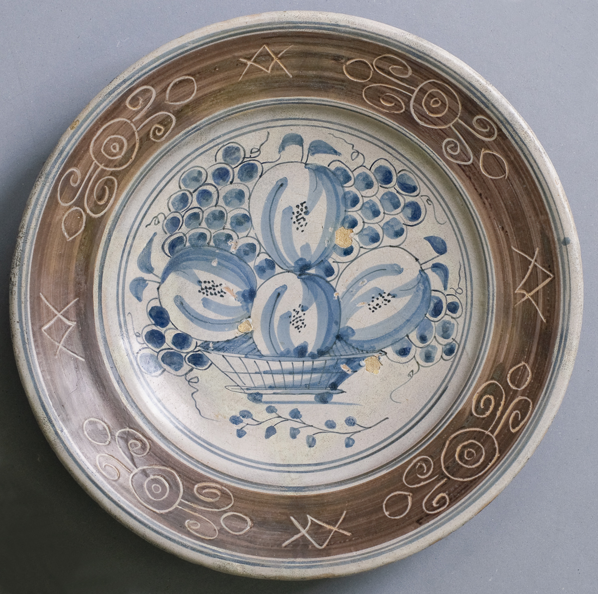 schotel (majolica) met fruitmand (sgraffito rand), Harlingen, 2de helft 17de eeuw; diam.35½ cm